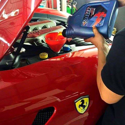 Motor oil changing Ferrari